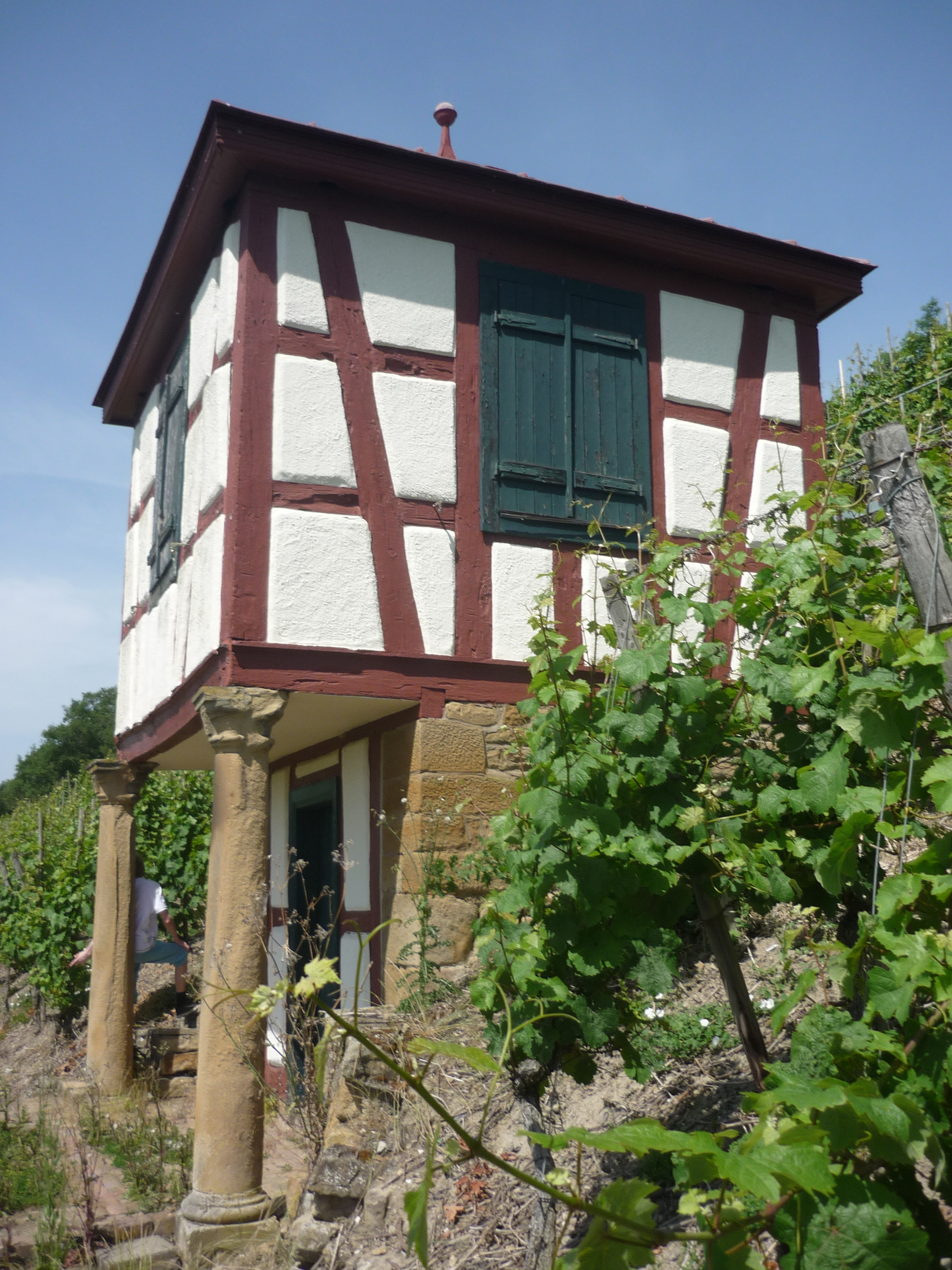 Weinberghaus Klostermühle Odernheim; denkmalgeschütztes Weinbergshaus nördlich des Ortes am Disibodenberg